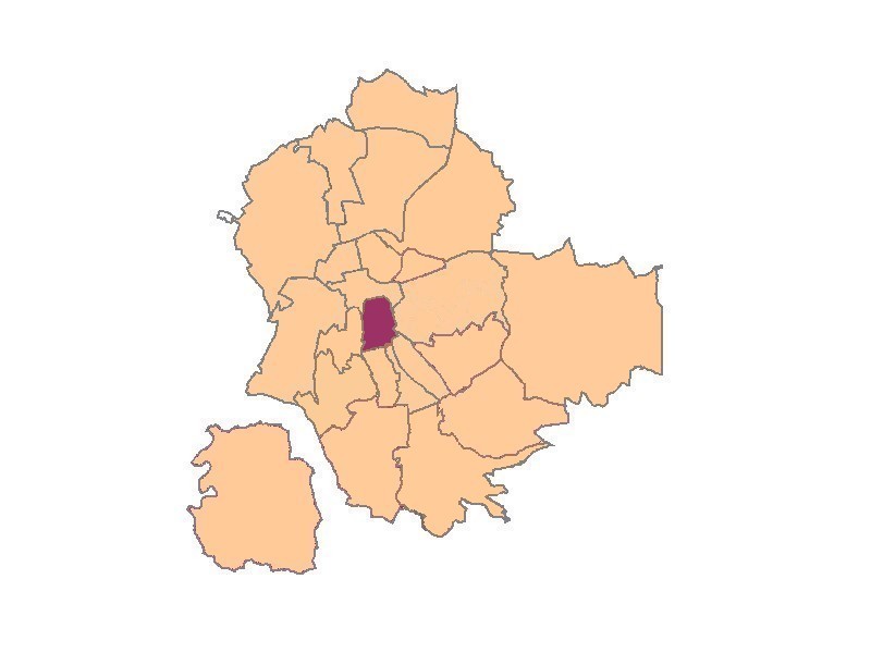 Plan de Saint-Etienne quartier de Saint Jacques Chavanelle